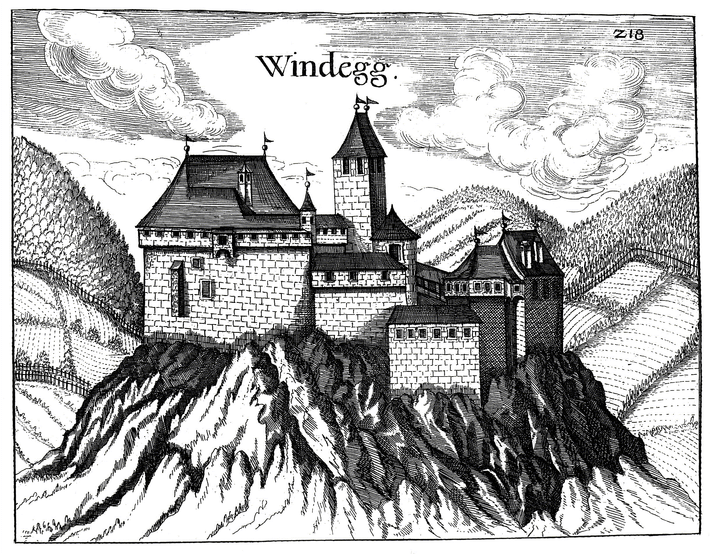 Kupferstich der Burg Windegg (Burgruine Windegg)